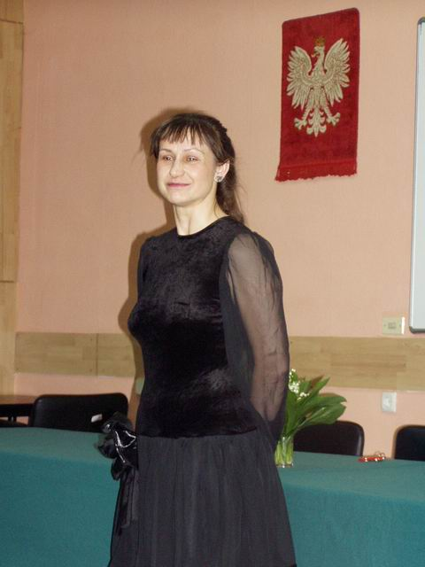 Elżbieta Gepfert, prezes Śląskiego Klubu Fantastyki podczas Seminarium Literackiego Śląskiego Klubu Fantastyki w Chorzowie, 2005.